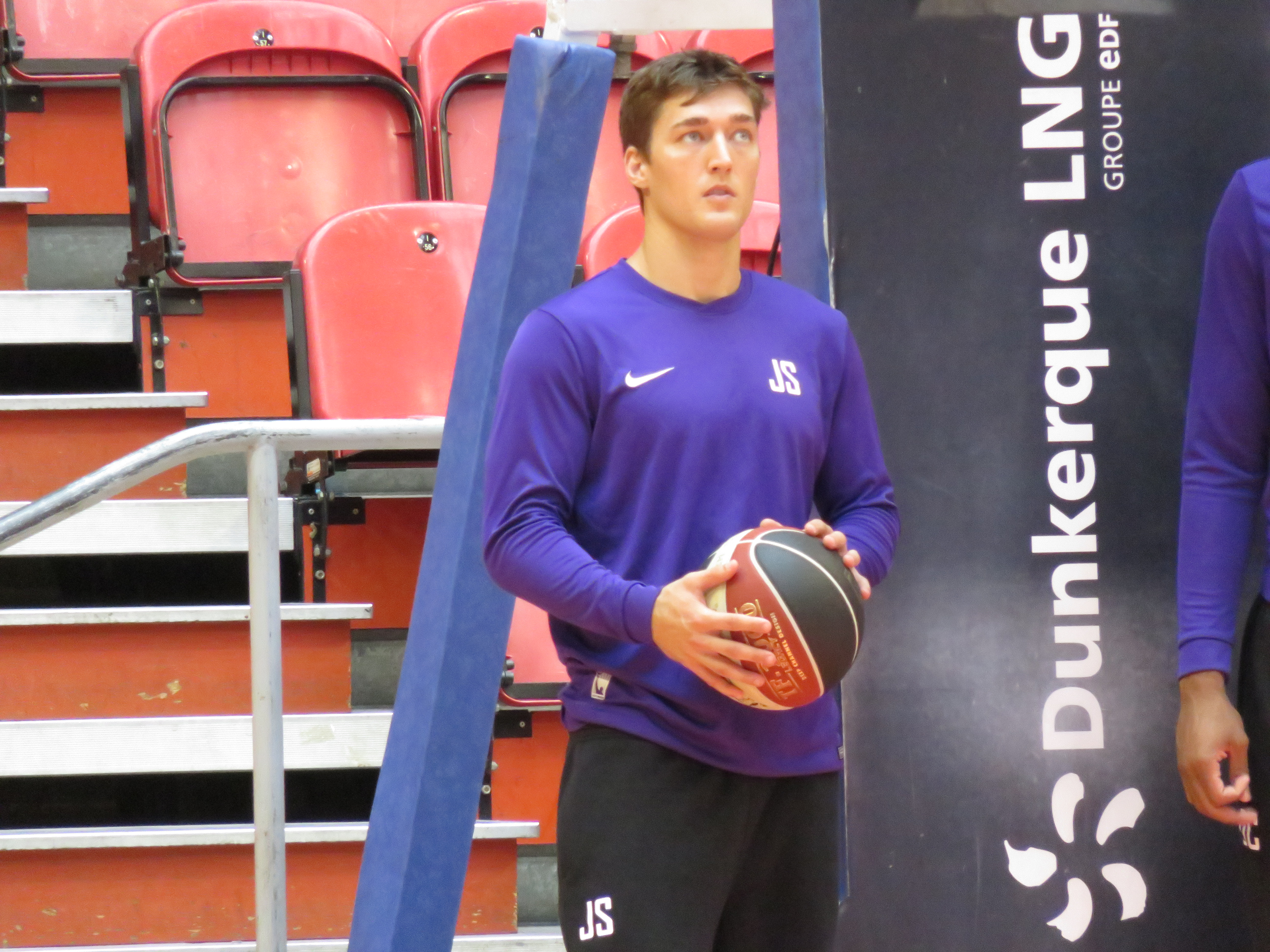 Jesse Sanders